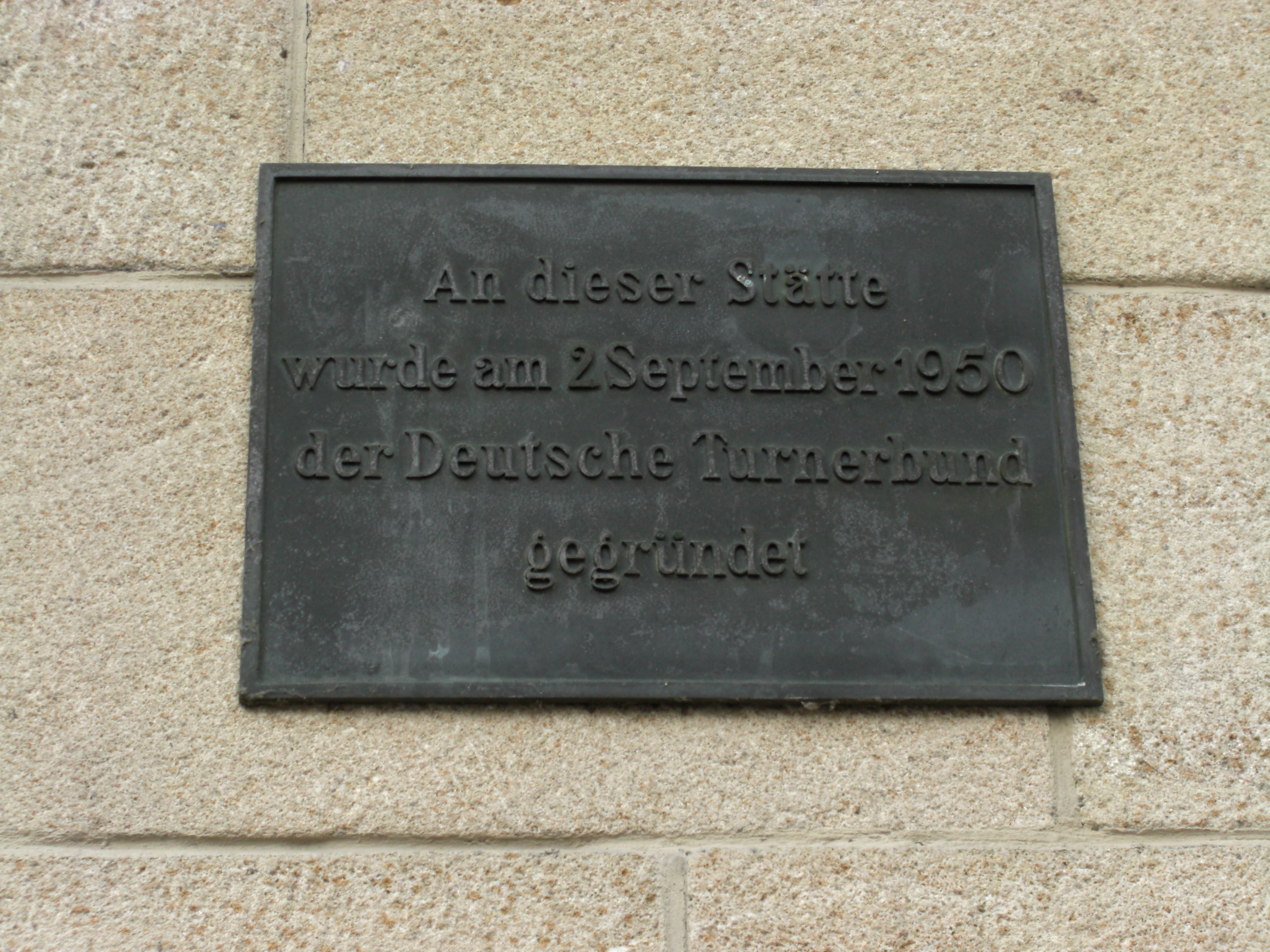 Gedenktafel „An dieser Stätte wurde am 2. September 1950 der Deutsche Turnerbund gegründet“ am Tübinger Rathaus.